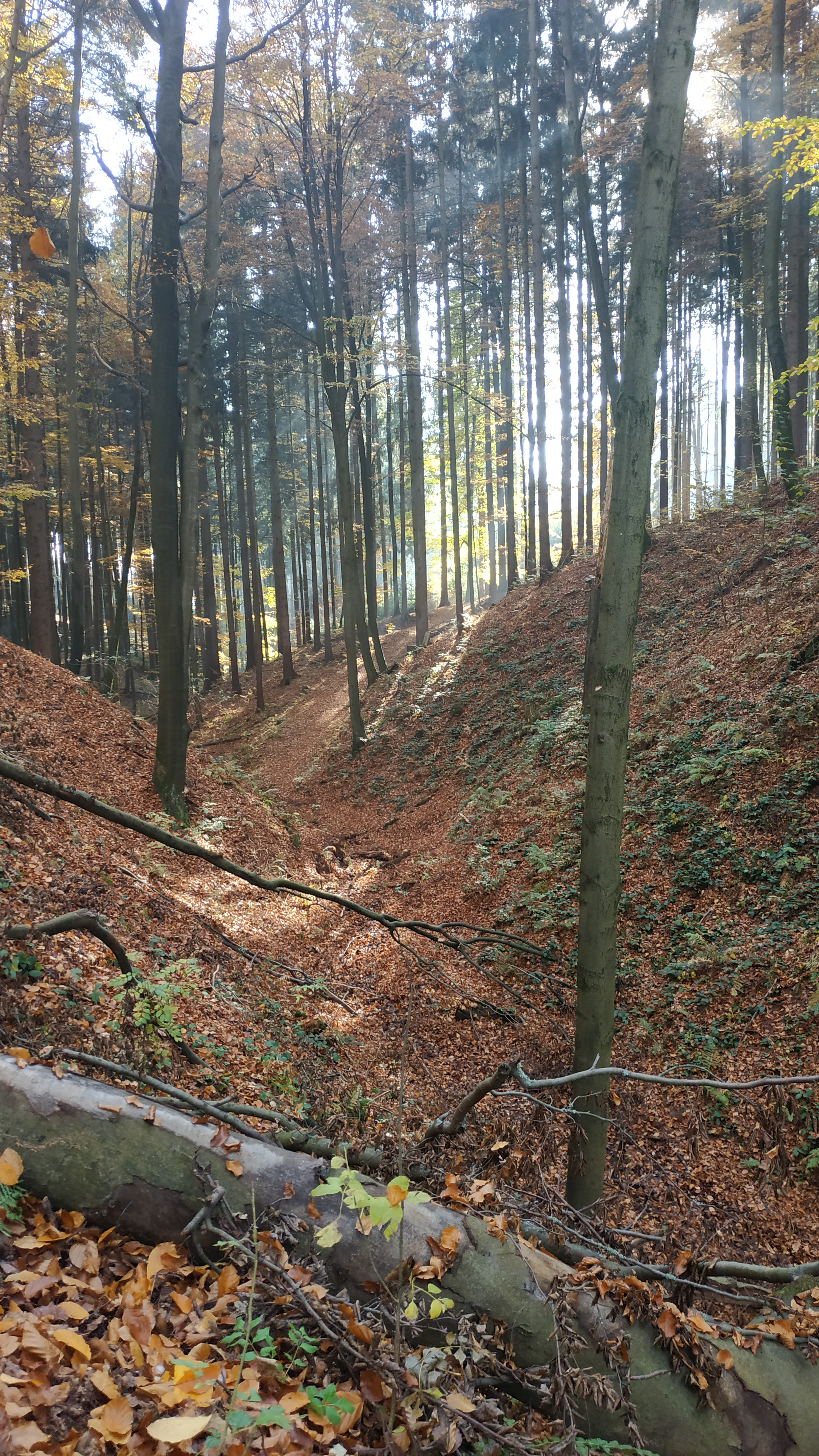 Zářez kaňonu ve tvaru V